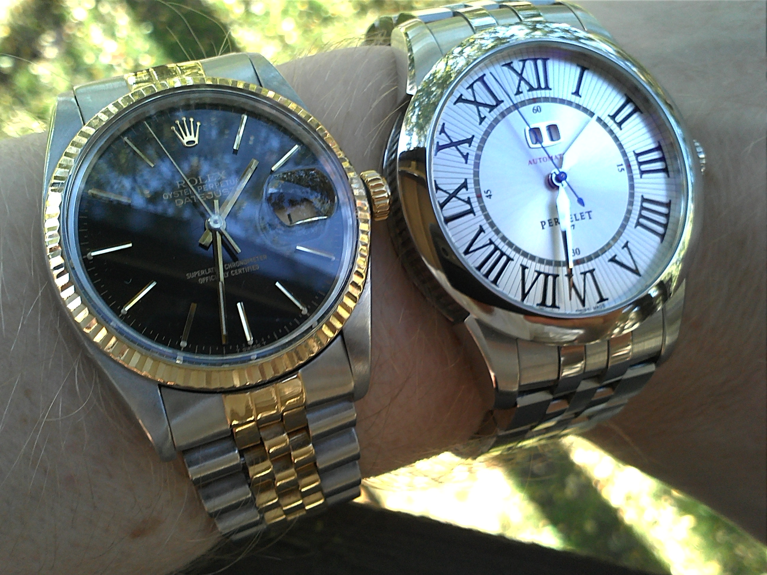 Rolex Datejust + Perrelet